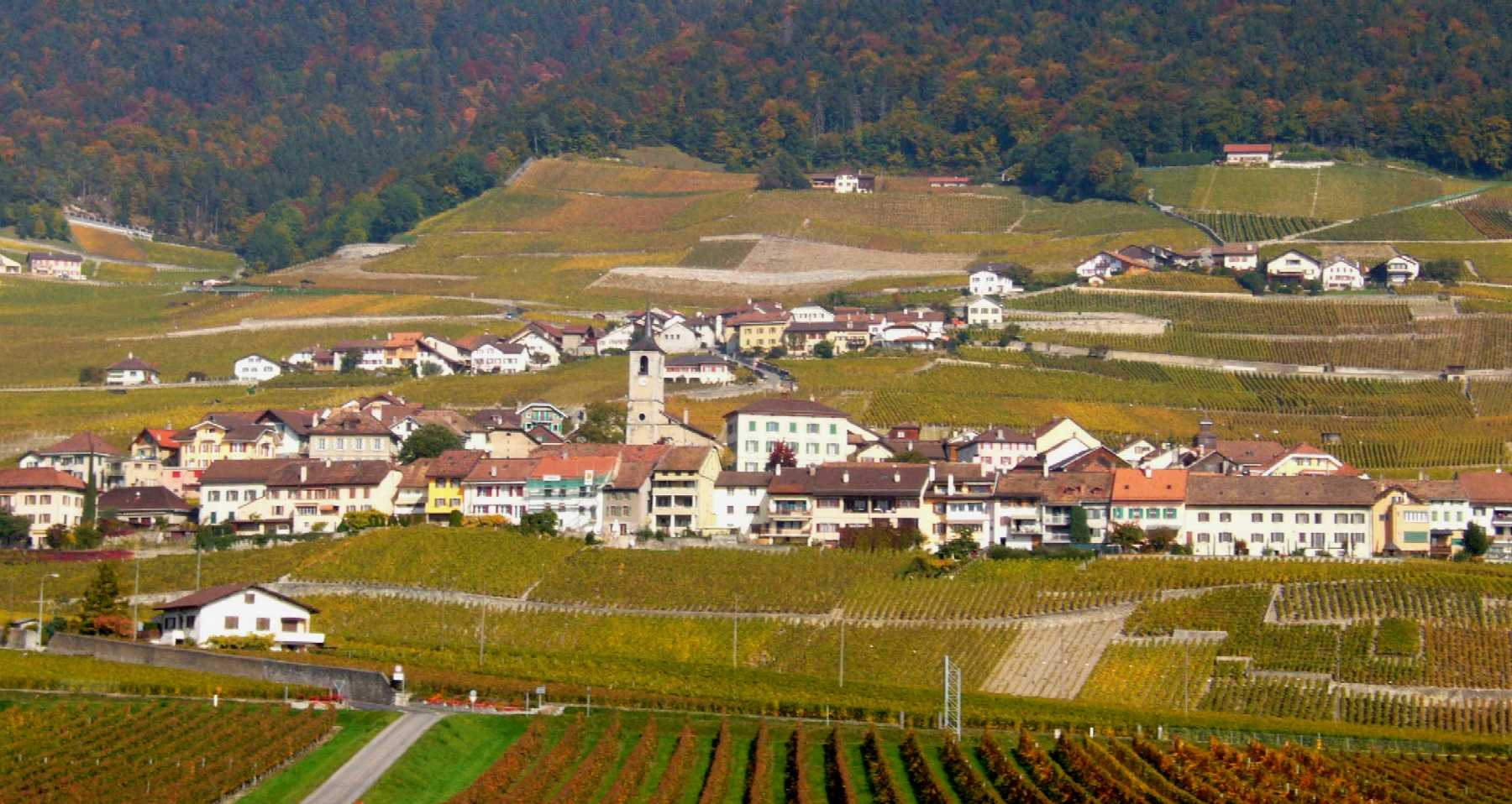 Yvorne, Kanton Waadt Aufnahme aus Südwesten